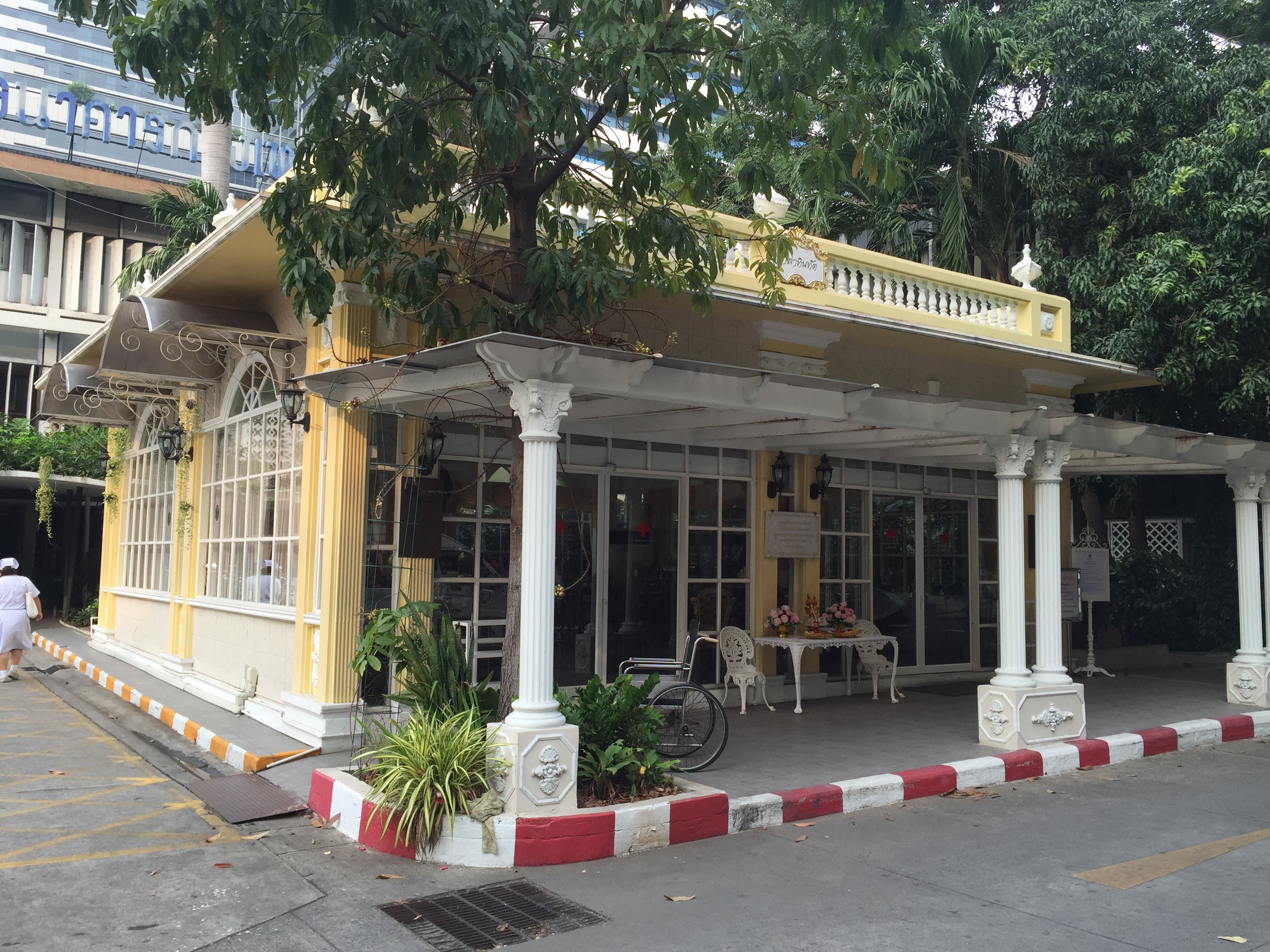 ศาลาทินทัต สถานที่แสดงความจำนงบริจาคร่างกายและอวัยวะ ภายในโรงพยาบาลจุฬาลงกรณ์ สภากาชาดไทย